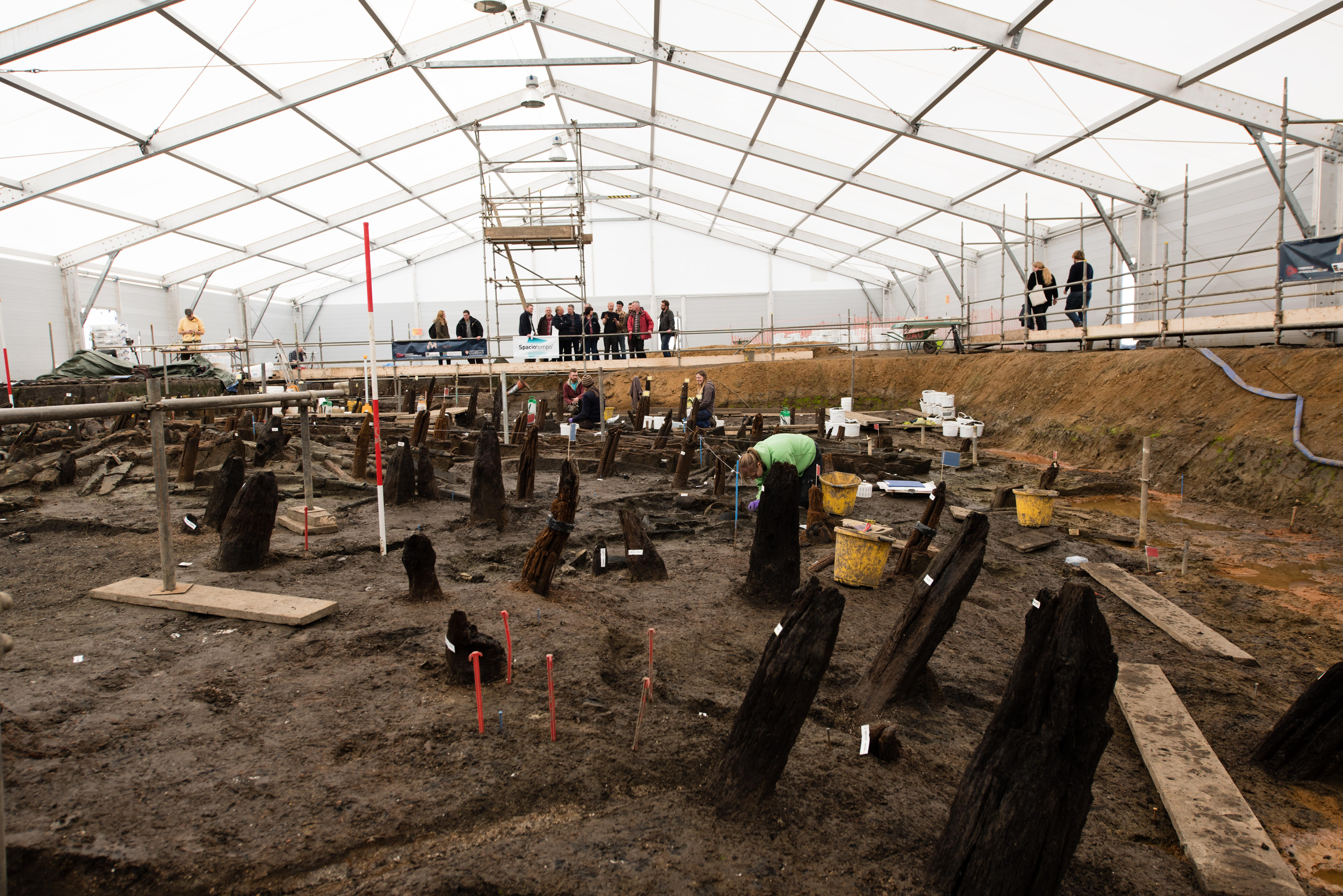 CL3_4800